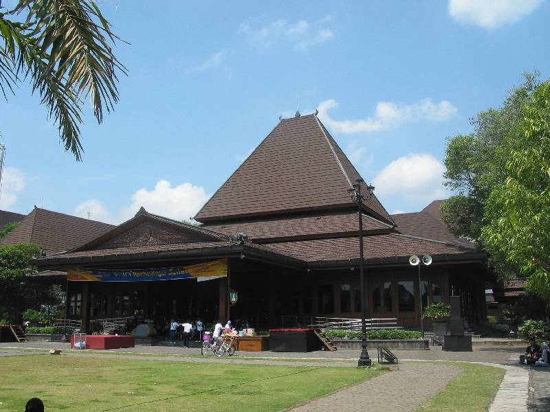 Surakarta City Hall